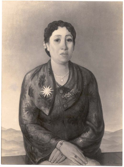 Foto. Portret van Teungkoe Permai Sjoeri van Langkat, Sumatra, 20 april 1940, olieverfschildering door Charles Sayers